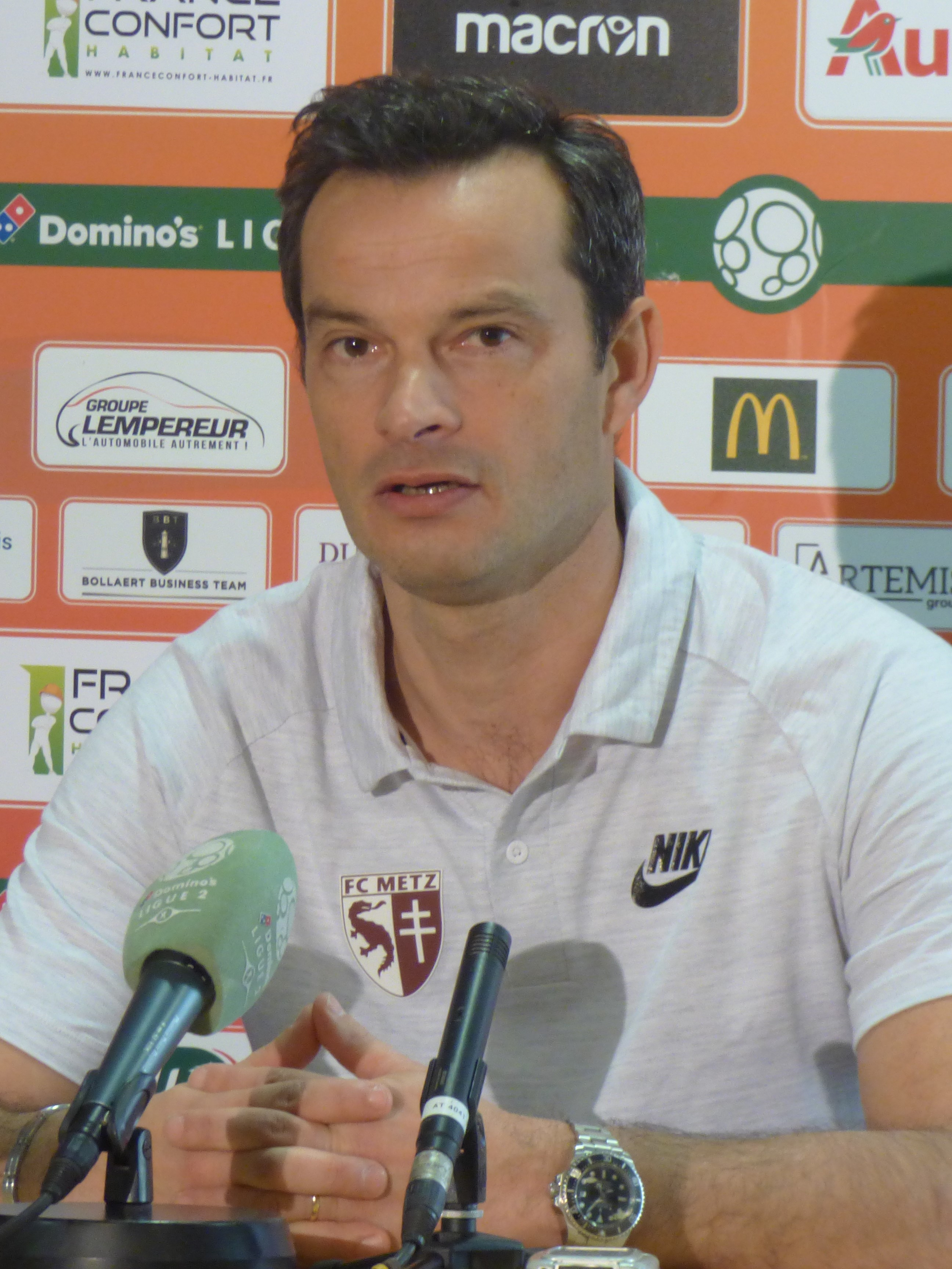 Vincent Hognon après le match RC Lens / FC Metz, comptant pour la vingt-quatrième journée du championnat de France de Ligue 2 2018-2019, le 9 février 2019, au Stade Bollaert-Delelis.